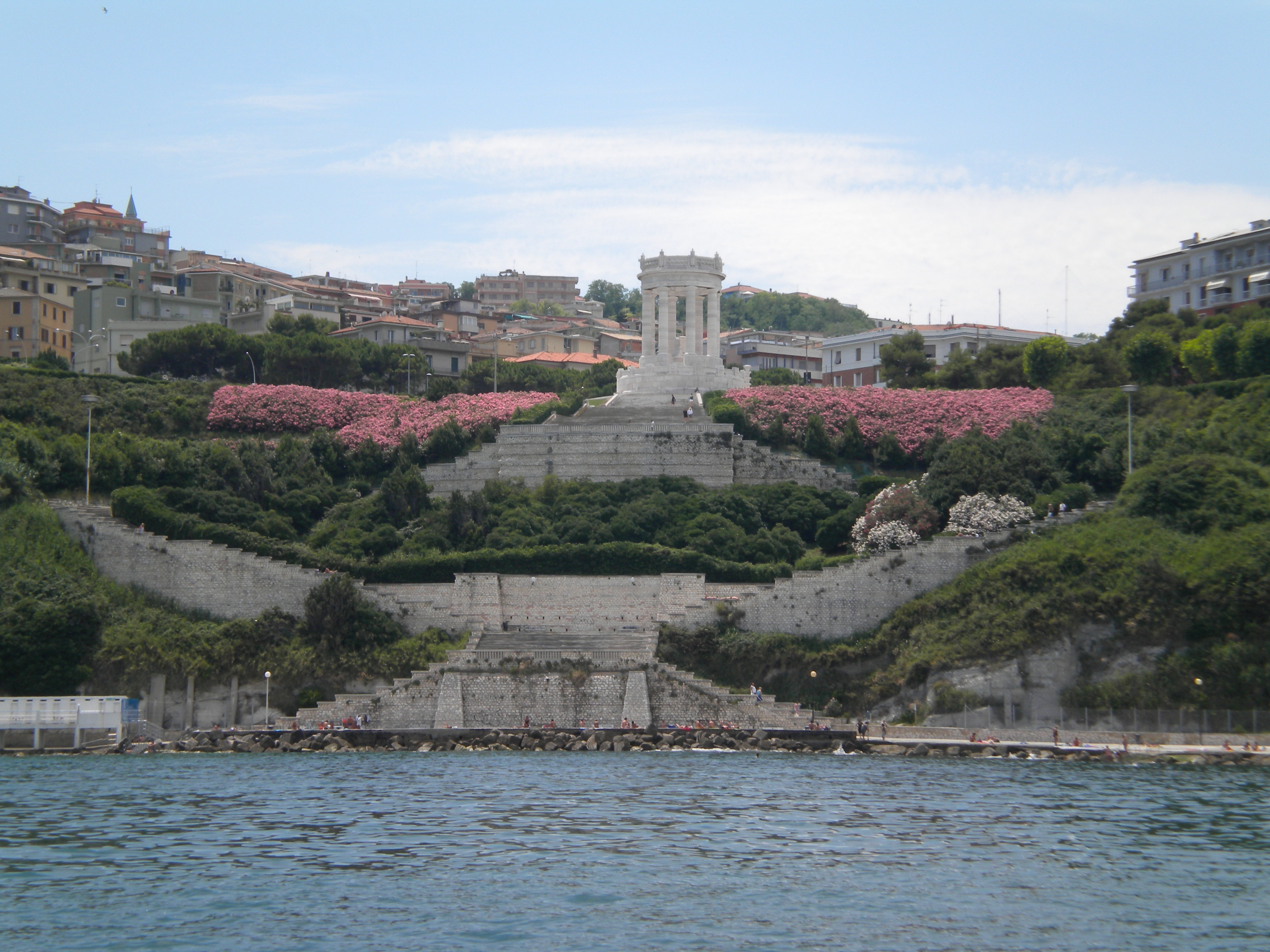 Monumento ai Caduti visto dal mare This is a photo of a monument which is part of cultural heritage of Italy.